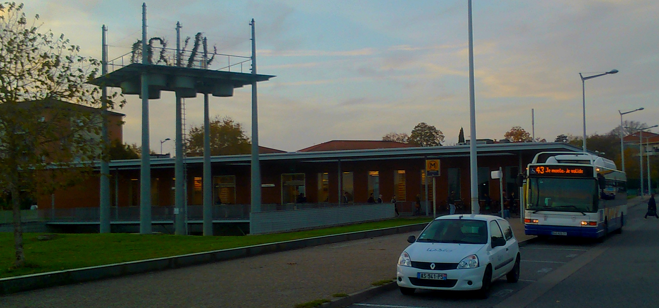 Bâtiment de la station de métro Argoulets à Toulouse